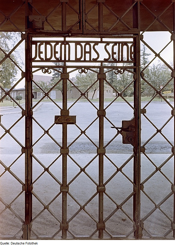 Original image description from the Deutsche Fotothek Weimar-Buchenwald. Nationale Mahn- und Gedenkstätte Buchenwald, schmiedeeisernes Lagertor mit der Inschrift "Jedem das Seine"